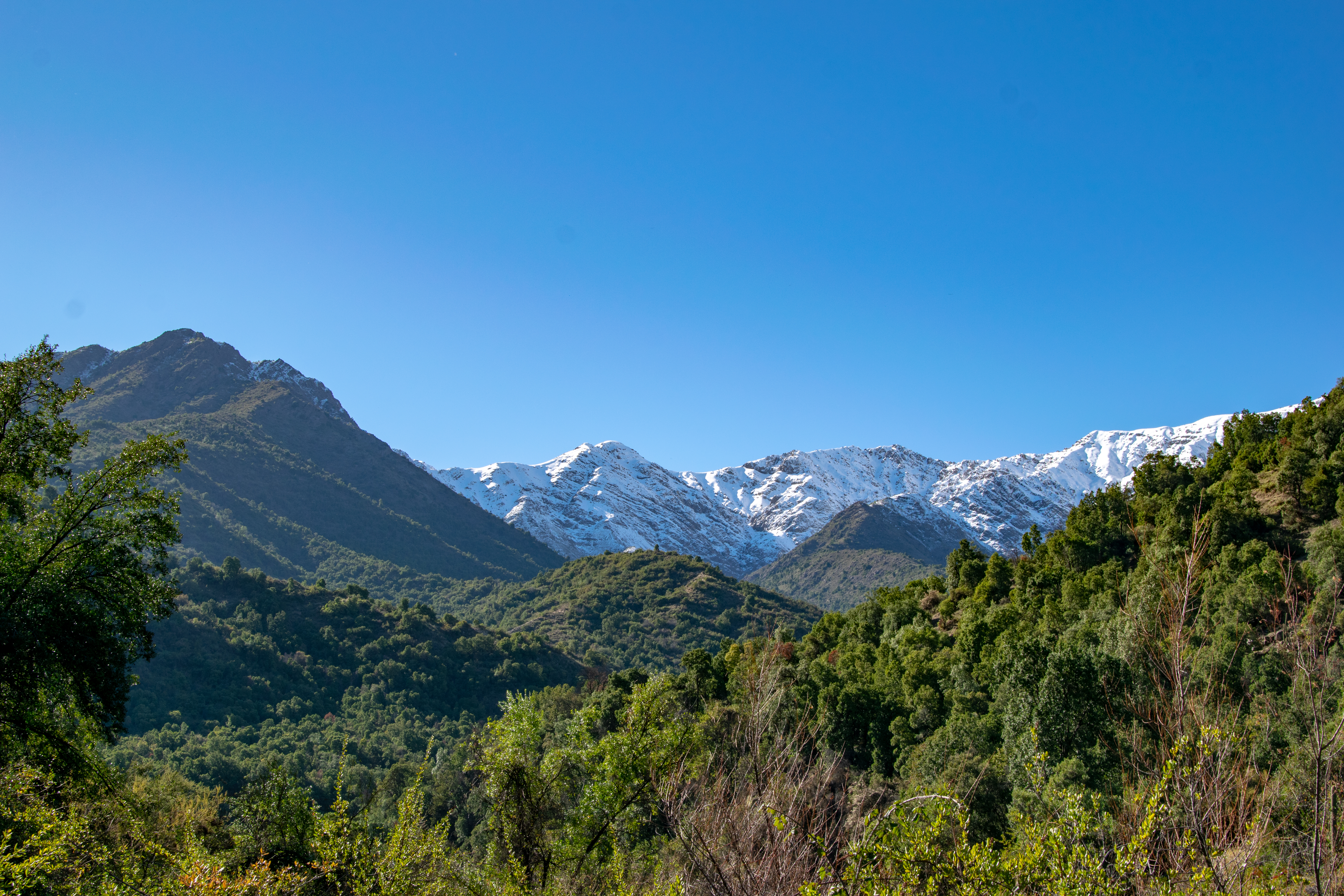 Uno de los senderos que se puede recorrer en el Parque Natural Rio Clarillo, se puede observar una diversidad de arboles nativos como son el el litre, peumo y quillay. Se observa además la Cordillera de los Andes nevada en los meses de invierno